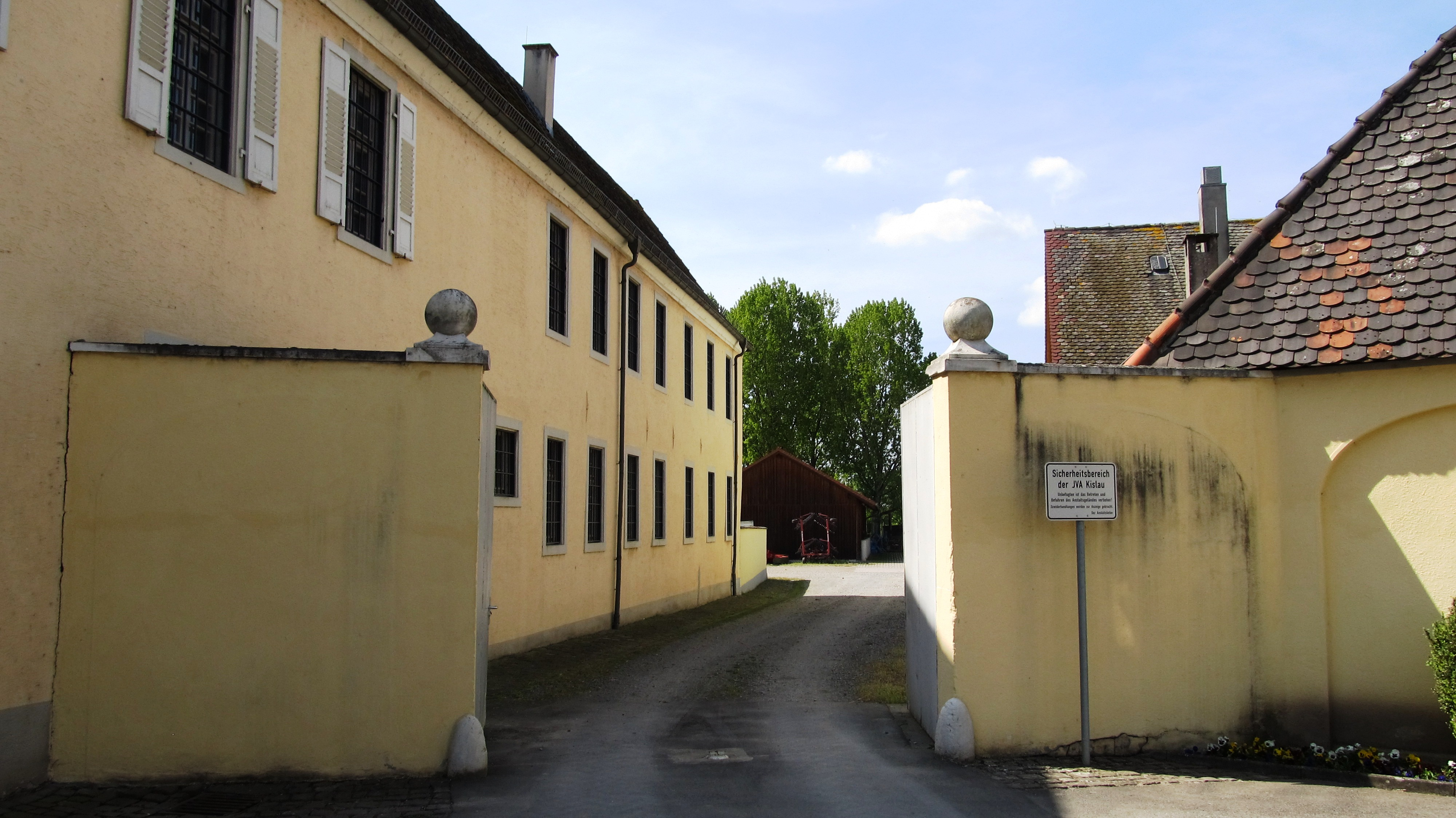 Das ehemalige KZ und Gefängnis gehört derzeit zur JVA Bruchsal.